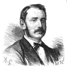 Frédéric-Émile d'Erlanger